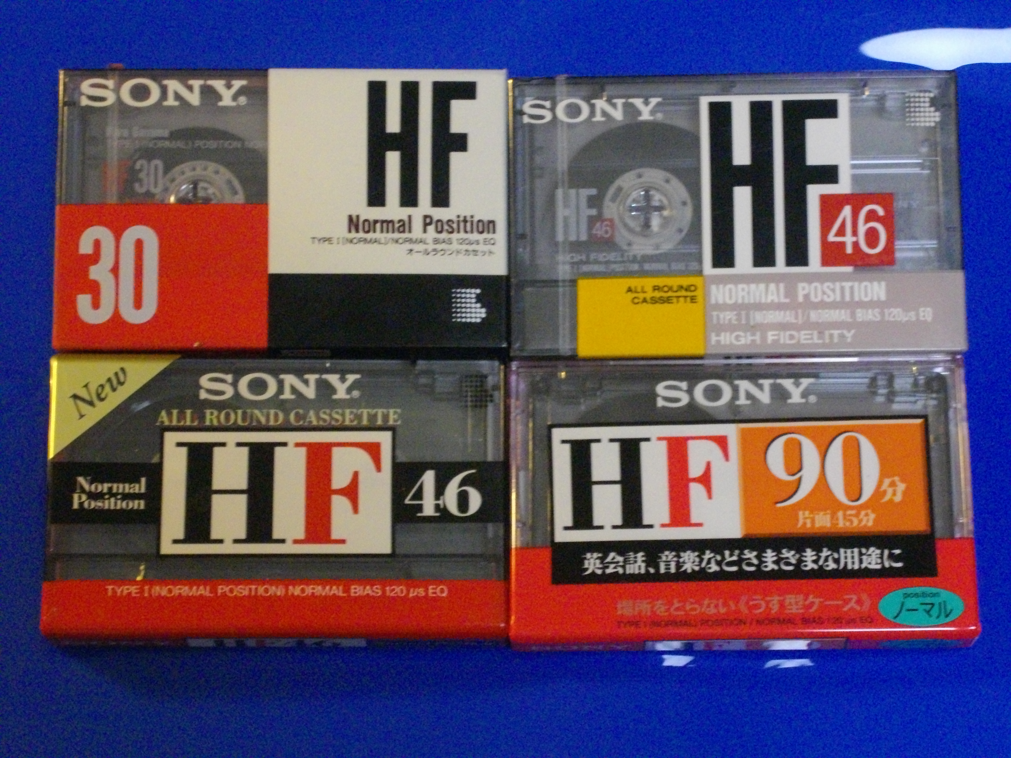 ソニーHF